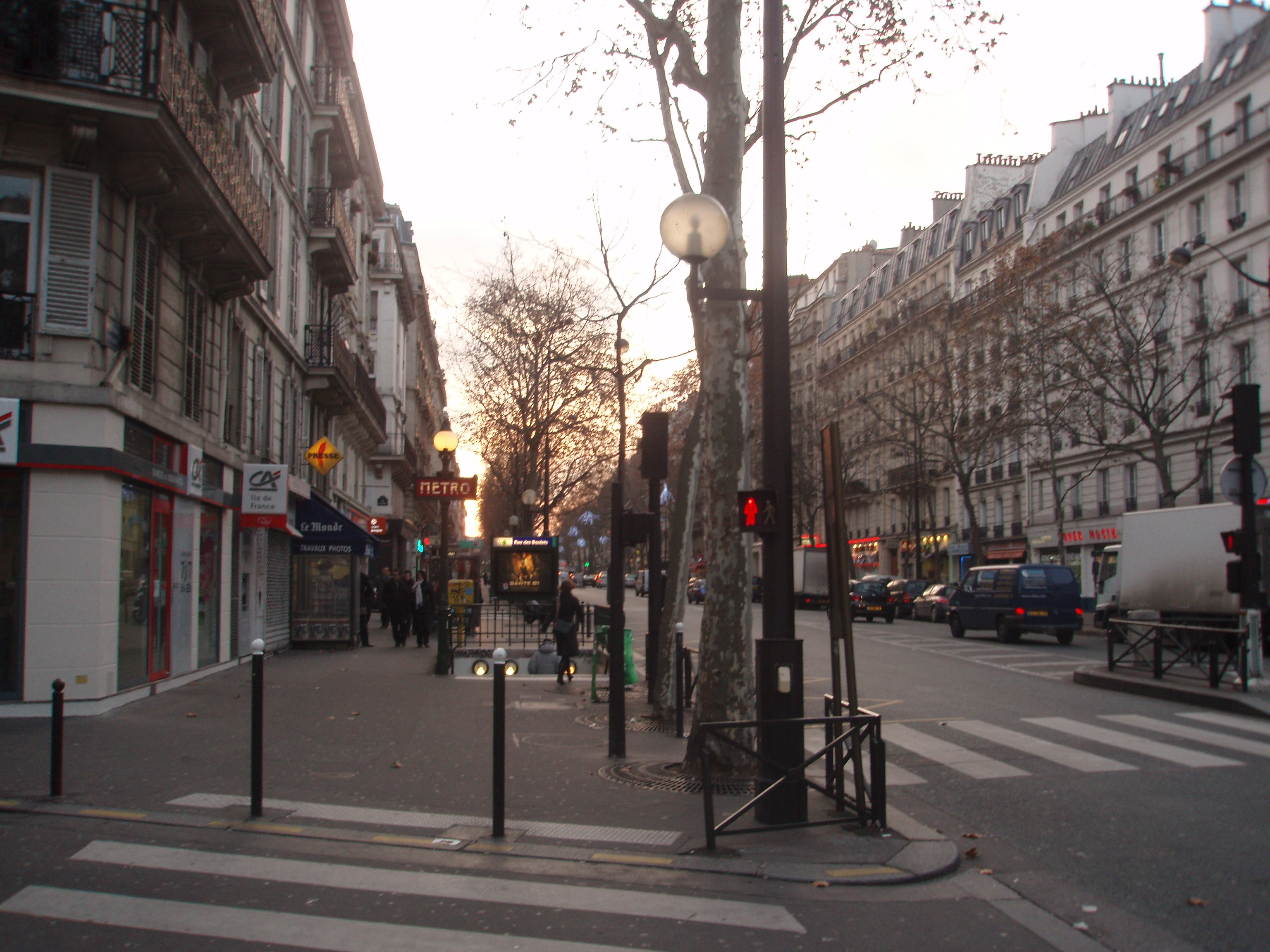 Boulevard Voltaire